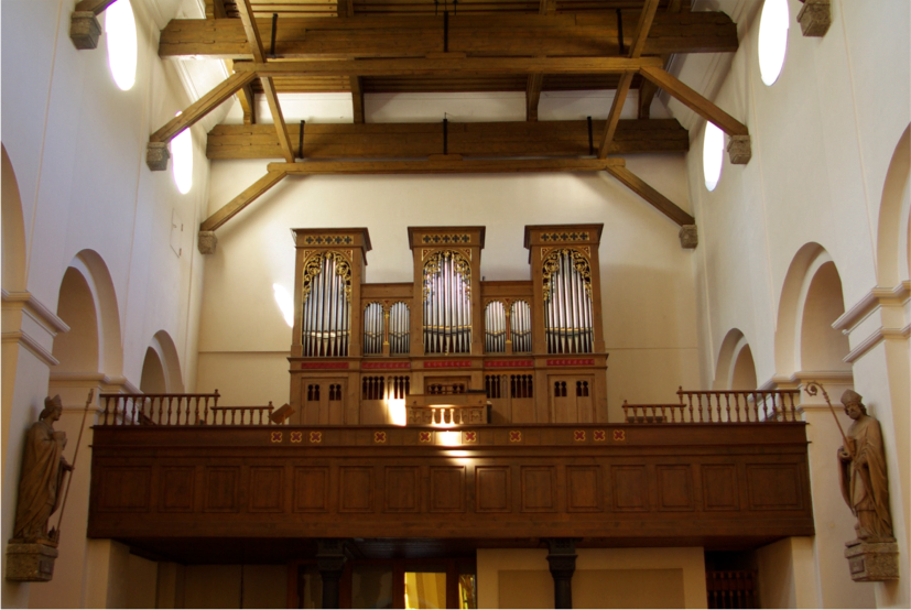 Kath. Pfarrkirche hll. Johannes Evangelist und Johannes der Täufer und Grabplatten